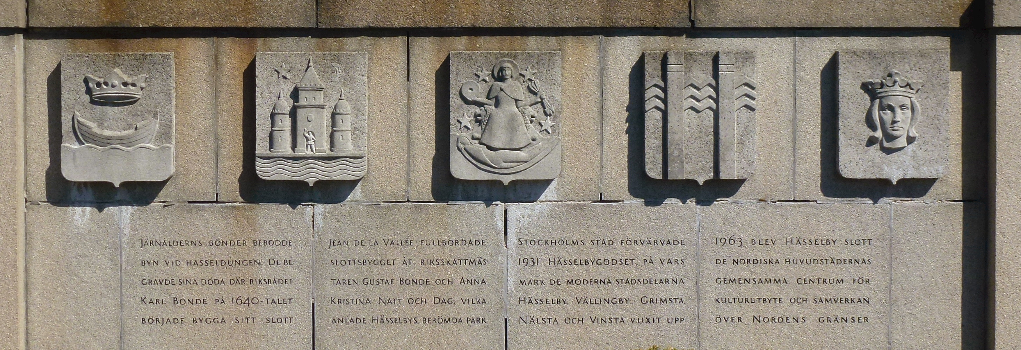 Hässelby slott, minnestavlor